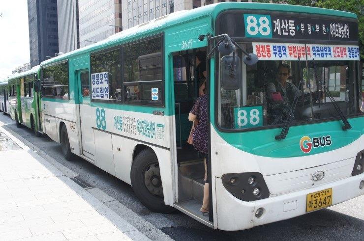 부천버스 부천시내버스 88번